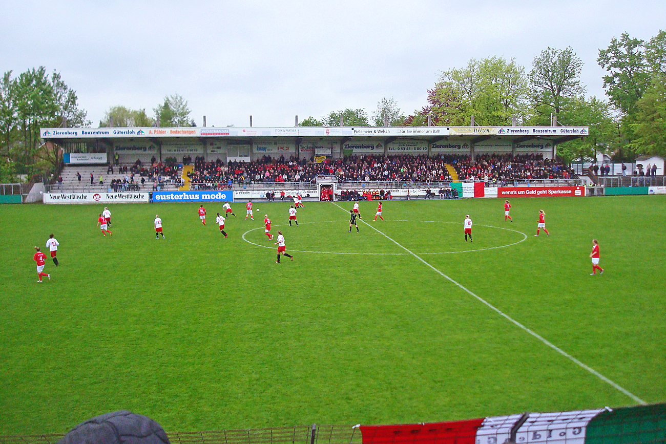 Heidewaldstadion Gütersloh, Blick auf die Sitzplatztribüne beim Heimspiel des FSV Gütersloh 2009 gegen den Mellendorfer TV